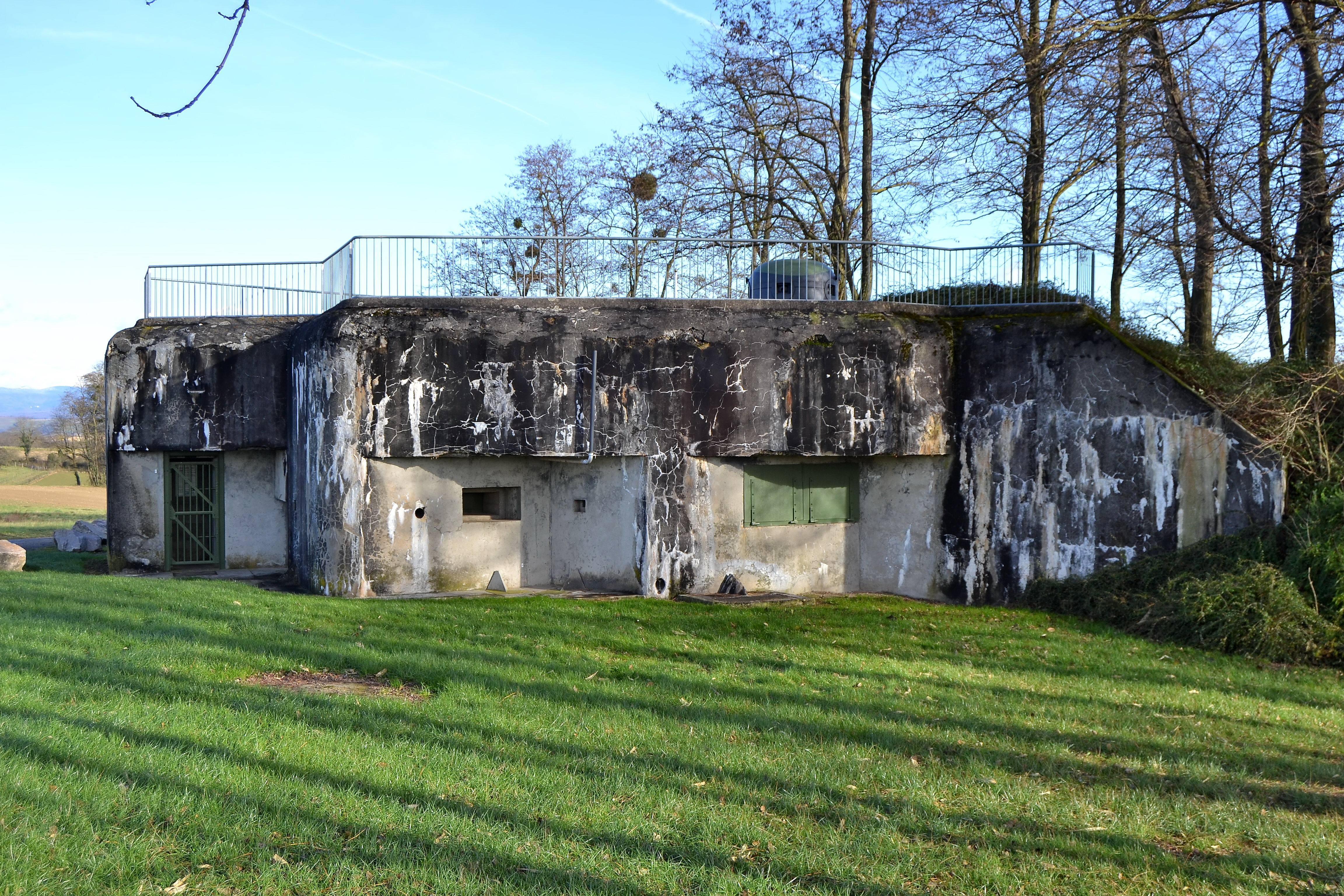 Casemate de l'Aschenbach n°86, Uffheim, Alsace, France